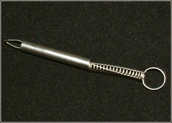 Zeckenzange in Gebrauch (1)